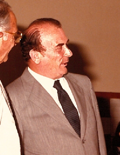 Silvano Tosi